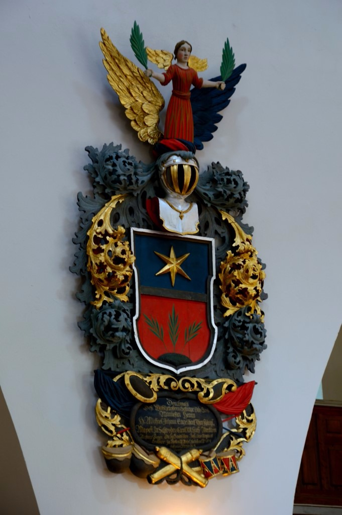 Engelhartu ģērboņepitāfija